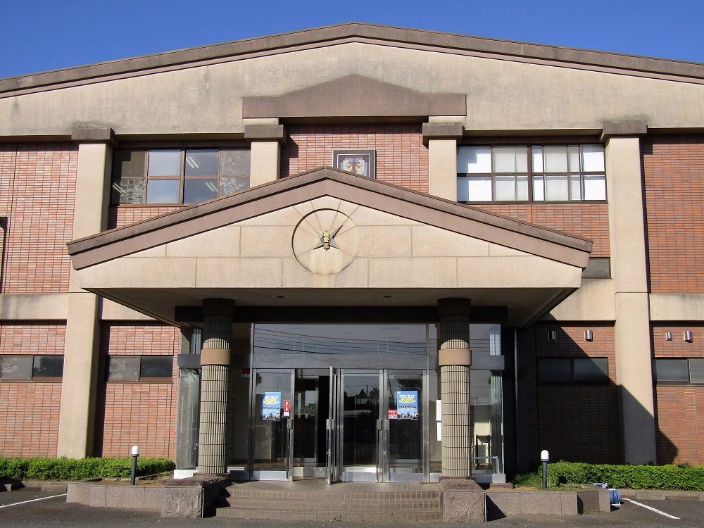 横芝敬愛高校(千葉県横芝光町)